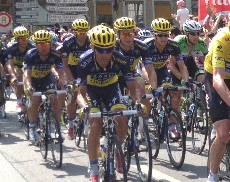 Etape 14 du Tour de France 2013.